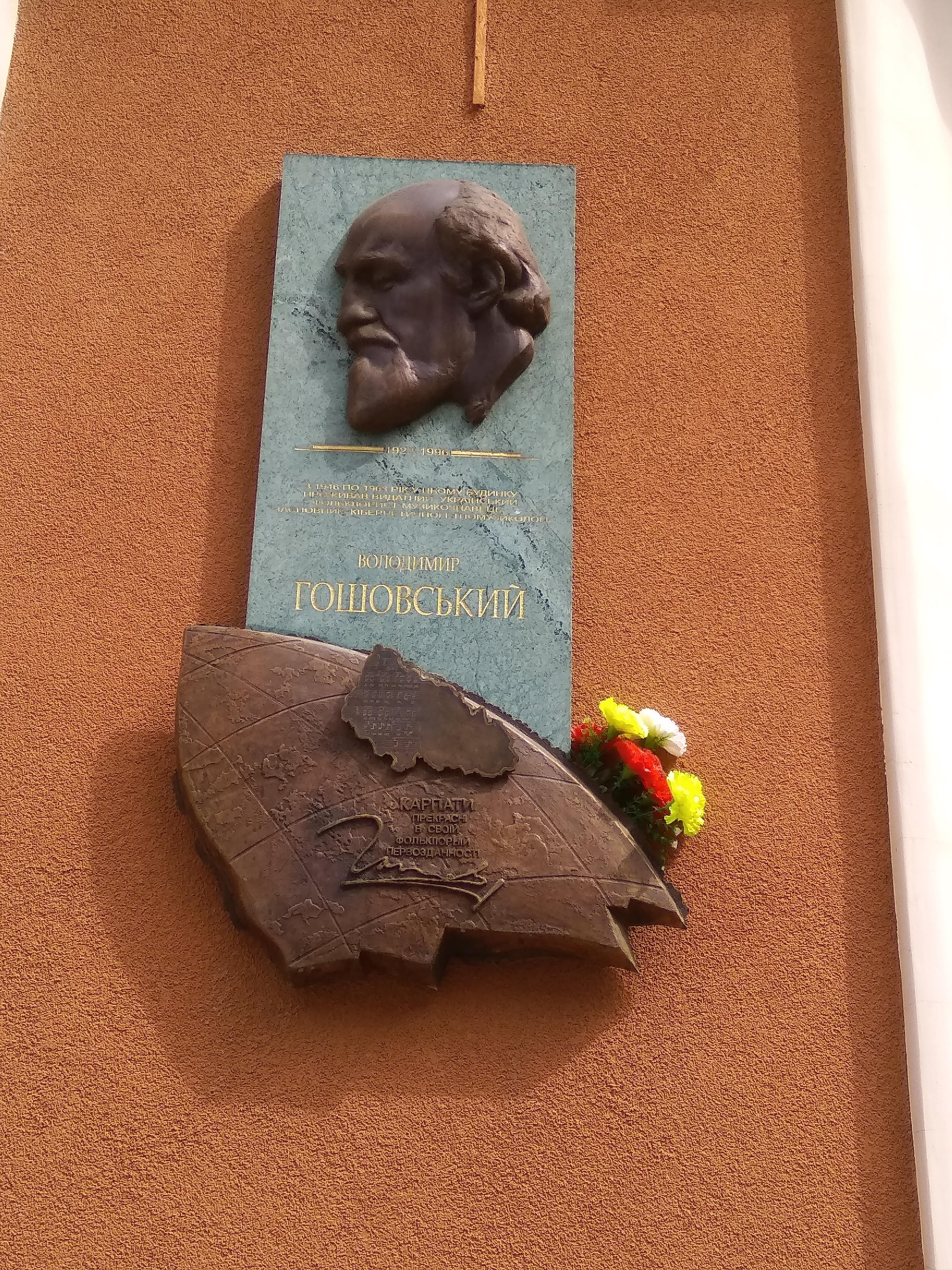 Житловий будинок, Ужгород, пл. Театральна, 15